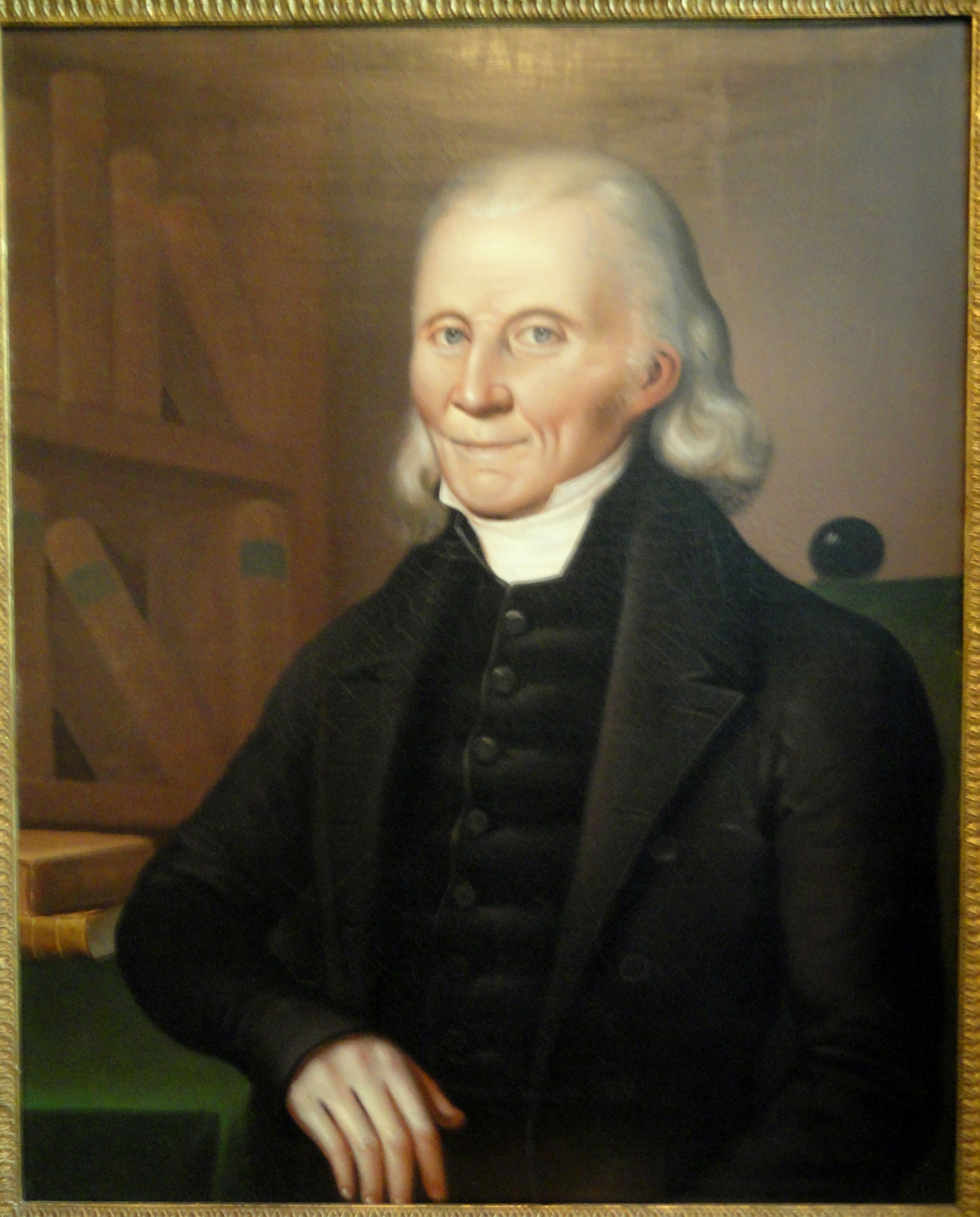 Johan Bonsdorff